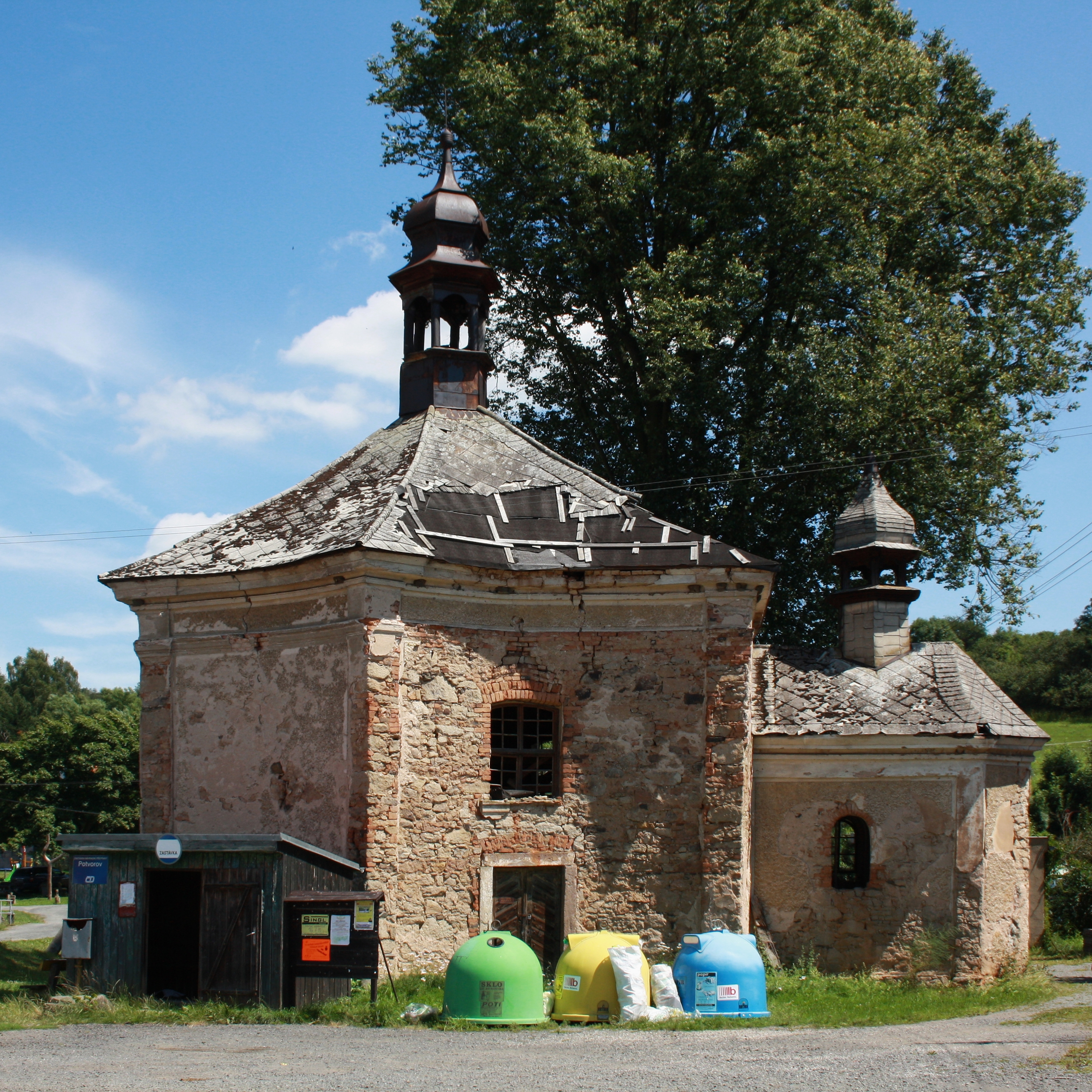 Přehořov - barokní kaple Nejsvětější Trojice